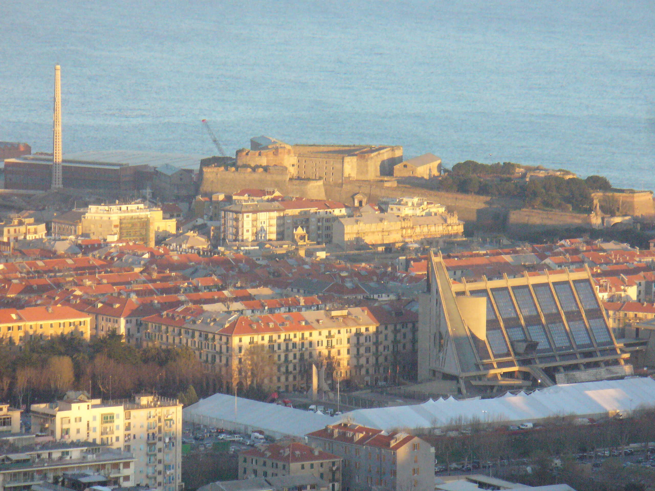 Fortezza del Priamar e parte del centro strorico dalle alture Savonesi